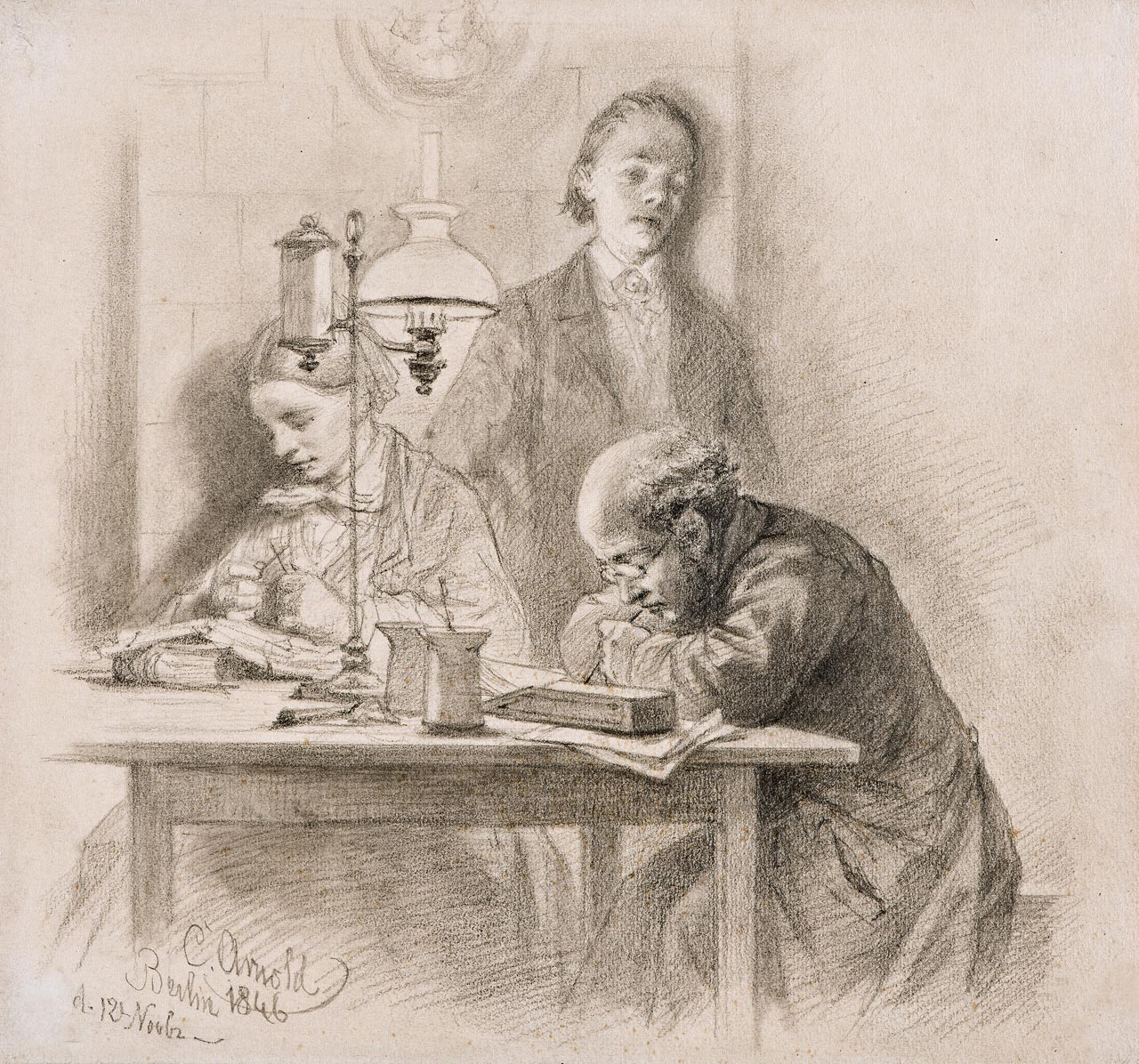 Adolph Menzel abends beim Schein der Lampe arbeitend